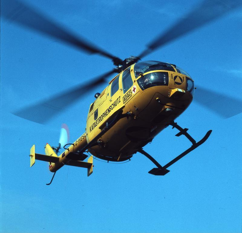 Zivilschutz, ADAC-Hubschrauber MBB BO 105 Katastrophenschutz / Rettungshubschrauber Typ Messerschmitt-Bölkow-Blohm BO-105 im Flug Information added by Wikimedia users.D-HGSC